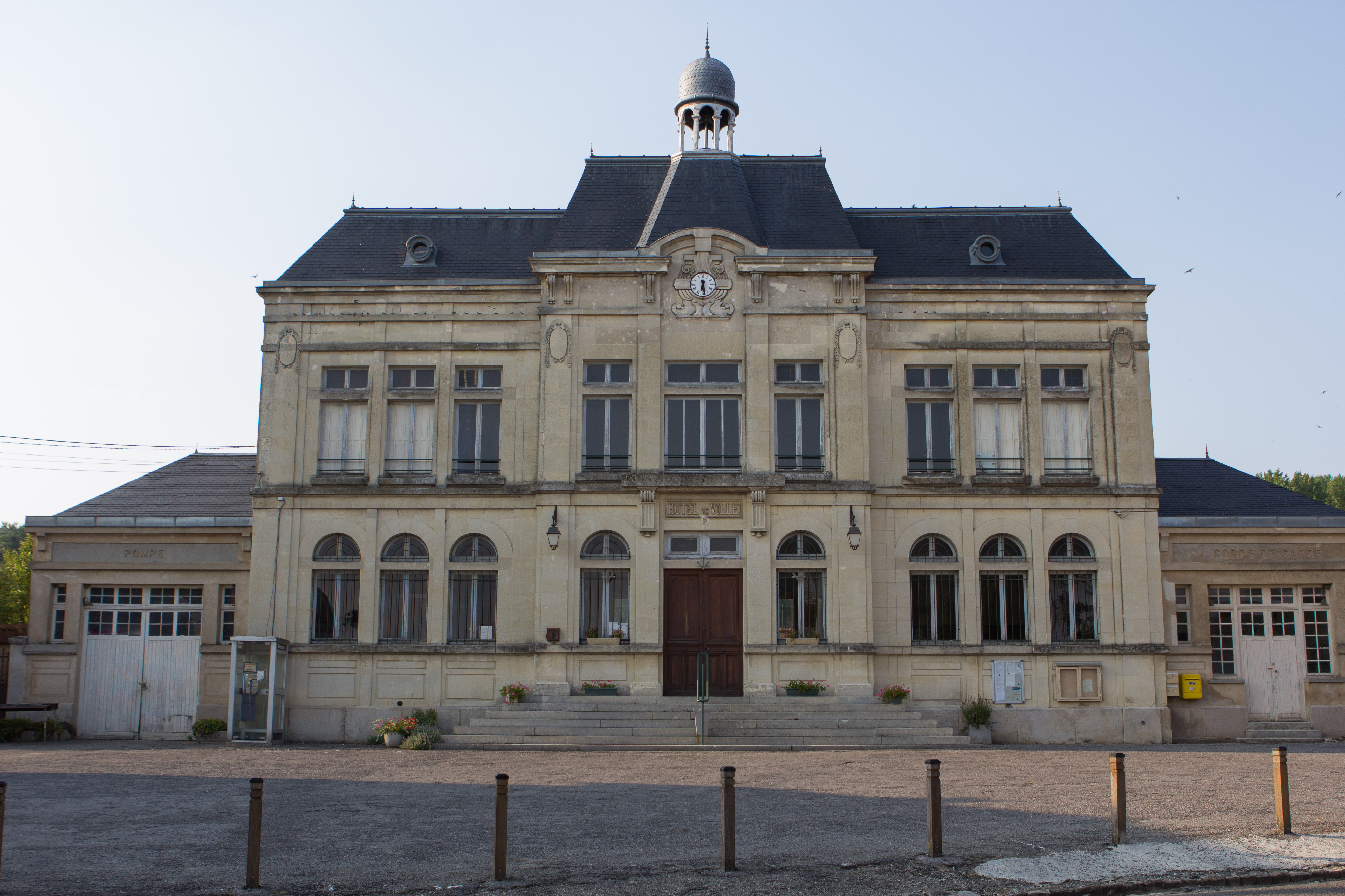 Mairie de Craonne / Craonne, Aisne, France